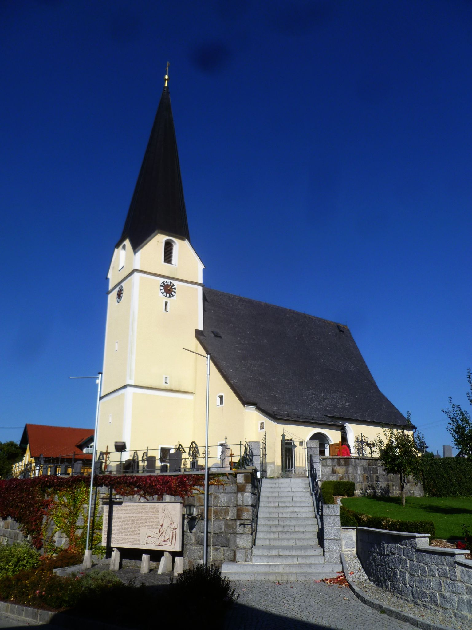 Kath. Pfarrkirche hl. Nikolaus und Friedhofsanlage